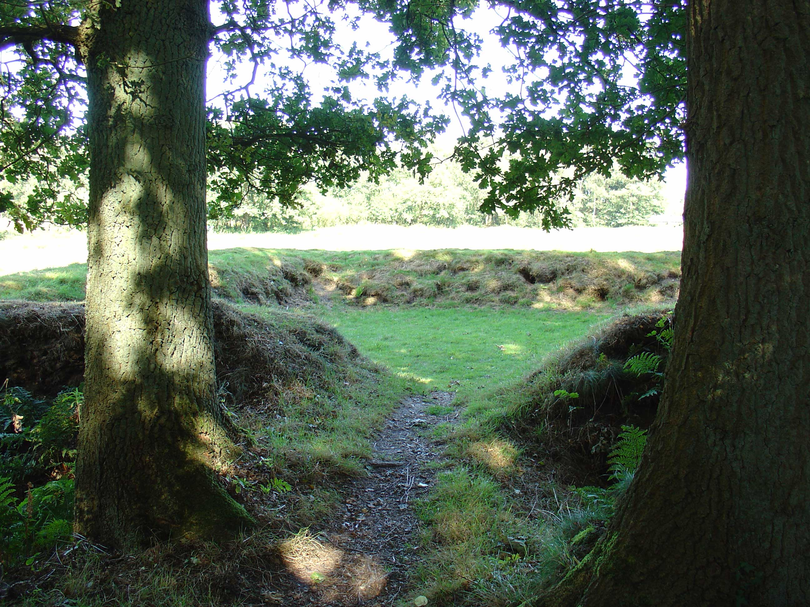 Poepenhemeltje, een schans bij Assen daterend uit 1672, naar verluid, opgeworpen door "Bommen Berend"